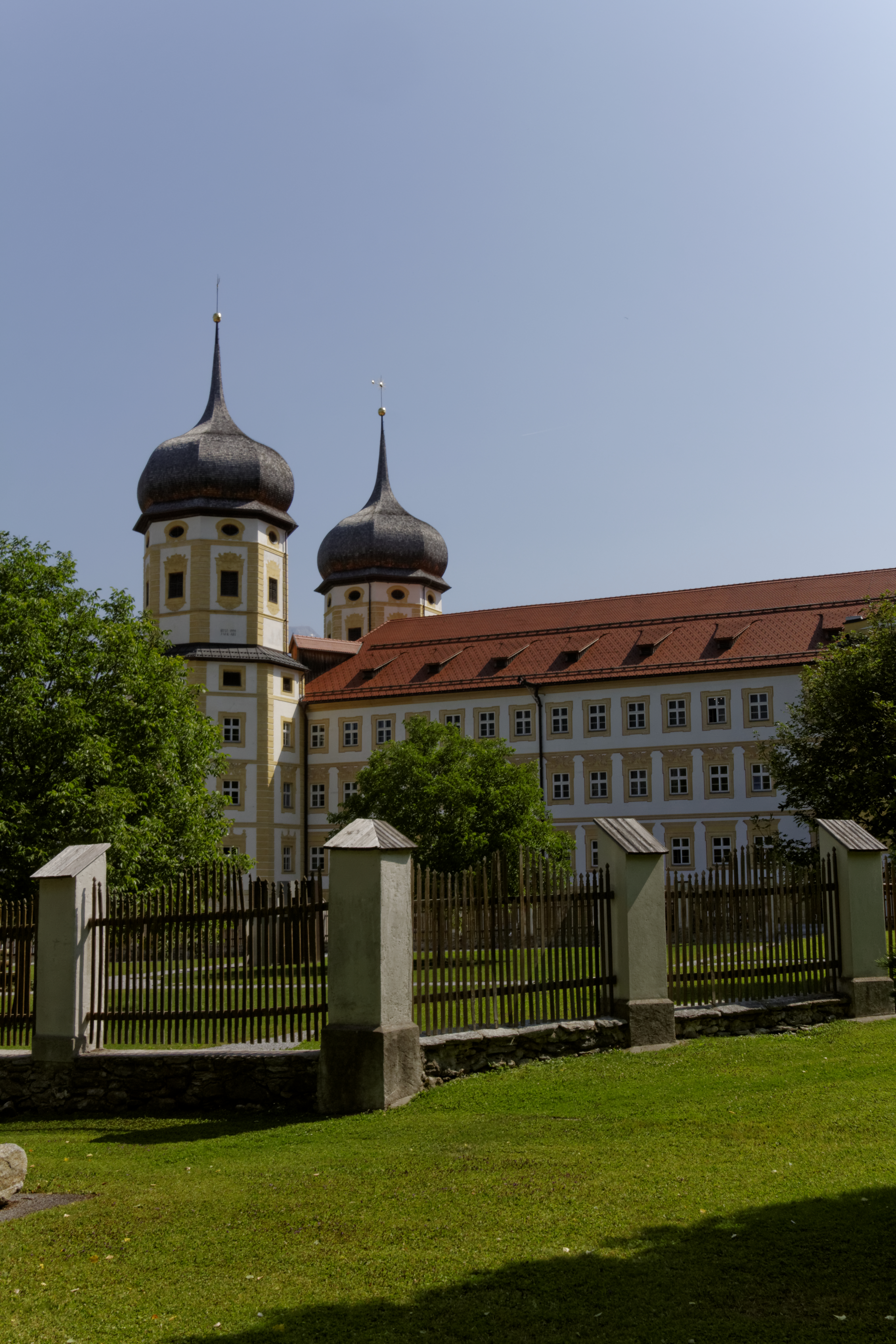 Stift Stams; Stams, Tirol, Austria